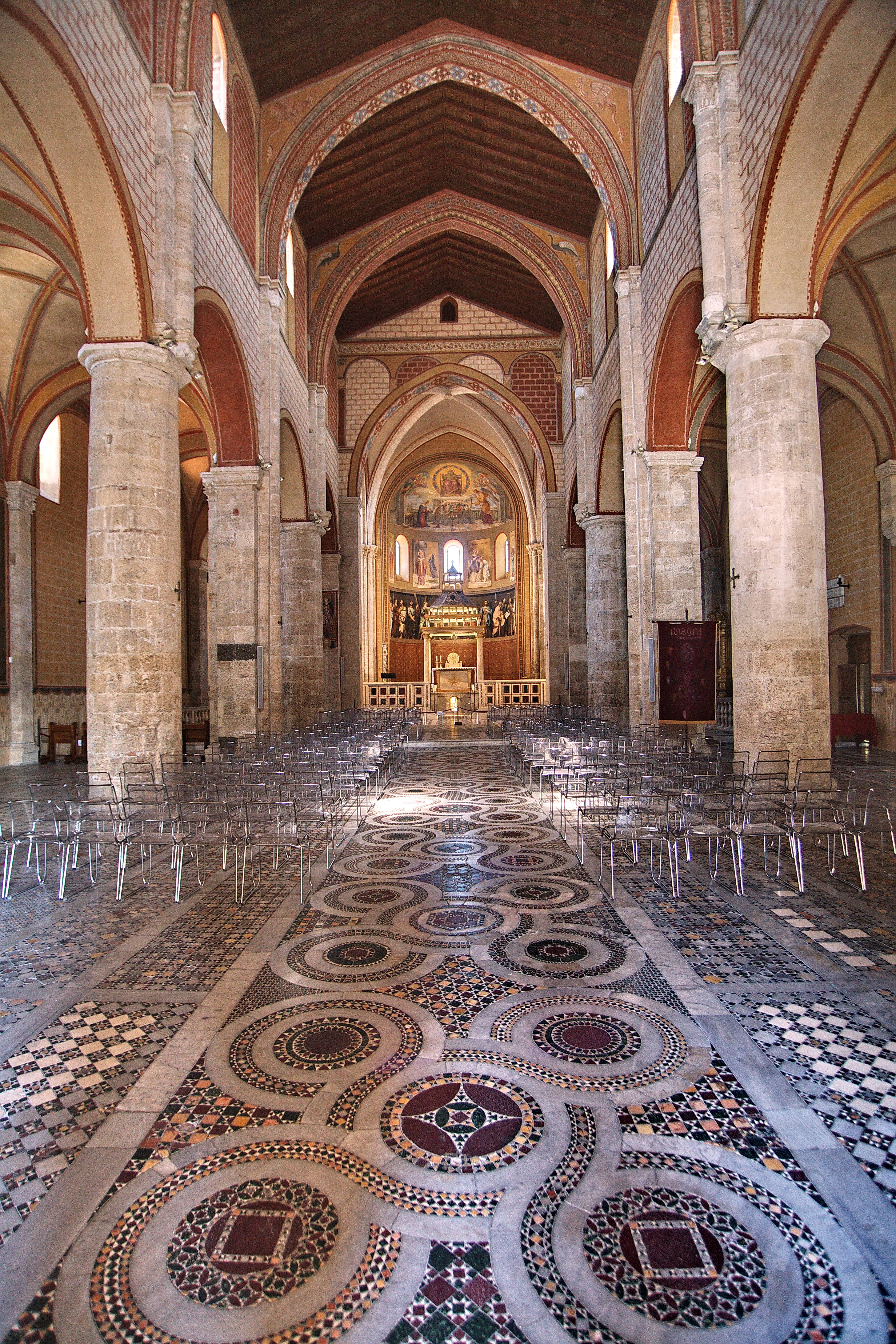 Cattedrale di Santa Maria This is a photo of a monument which is part of cultural heritage of Italy.